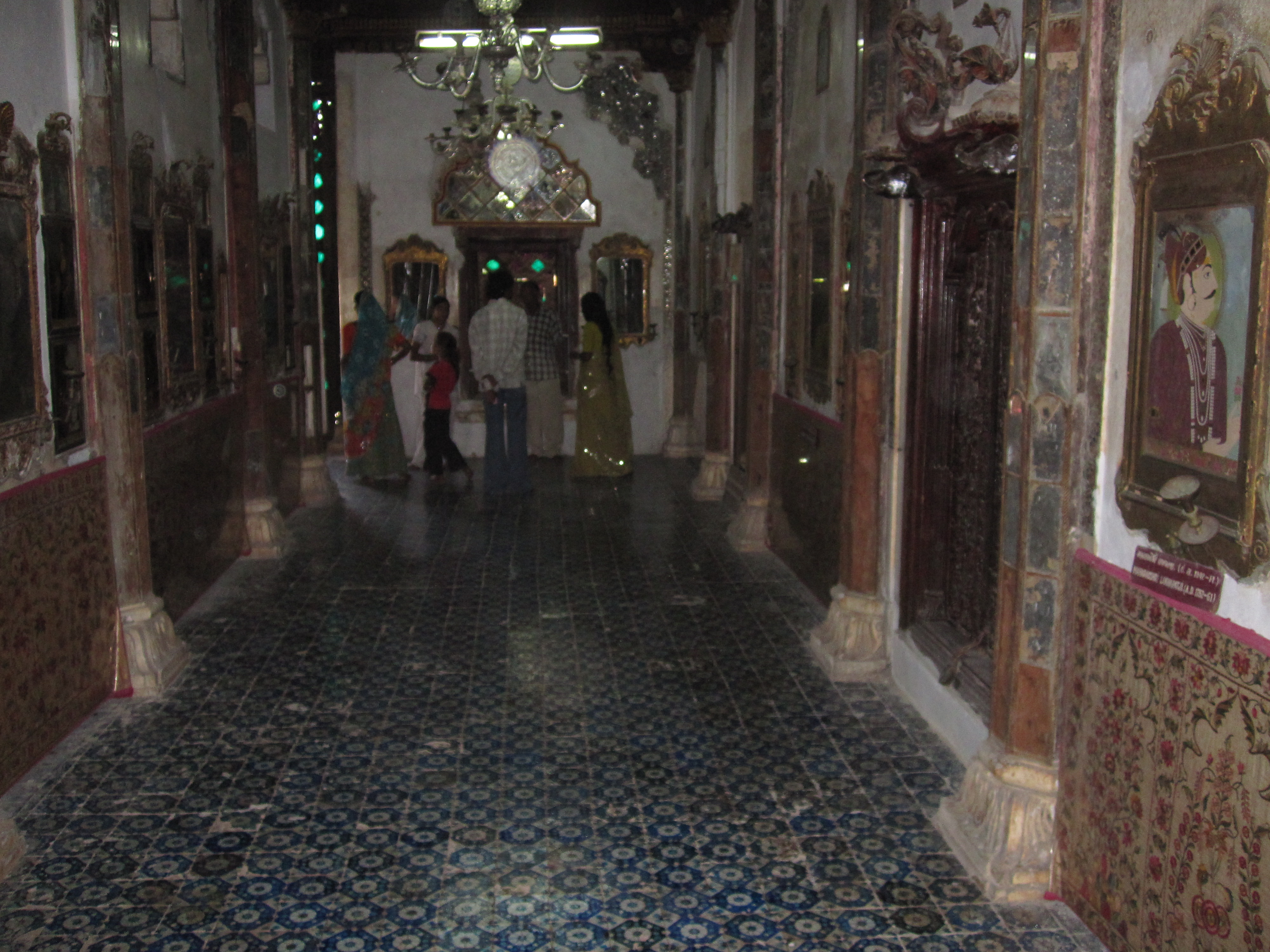 Aina Mahal, Bhuj